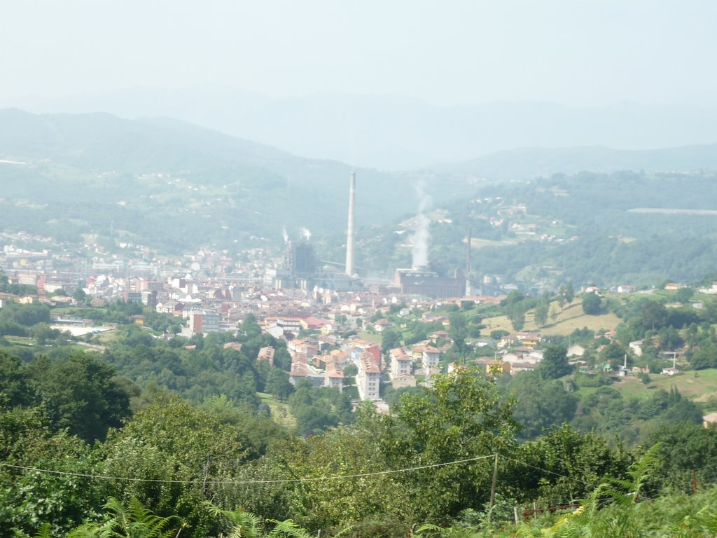 La Felguera en el Valle del Nalón, desde la aldea de La Nava (Langreo) Asturias